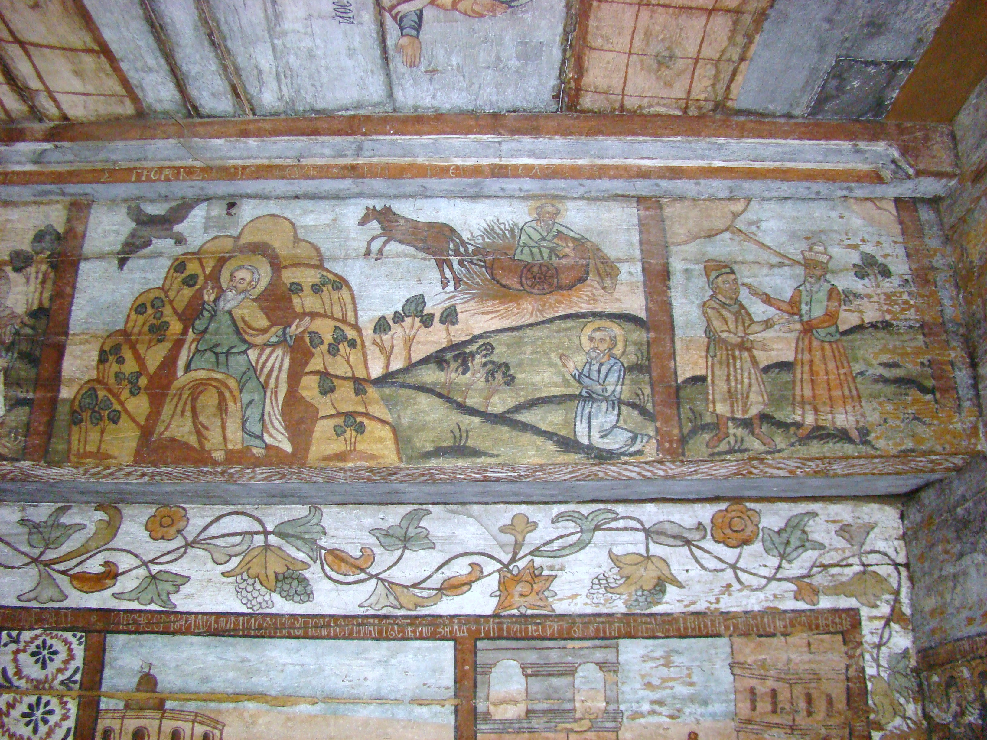 Biserica de lemn "Sfântul Nicolae", sat BOGDAN VODĂ